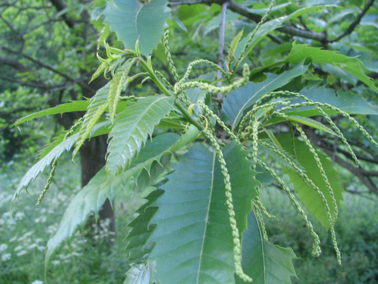 Eigen foto. Houthem St Gerlach GerardM 10 jun 2004 08:13 (CEST)